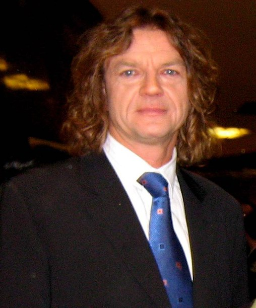 Jacek Wszoła (ur. 30 grudnia 1956 w Warszawie) - polski lekkoatleta, specjalista skoku wzwyż.